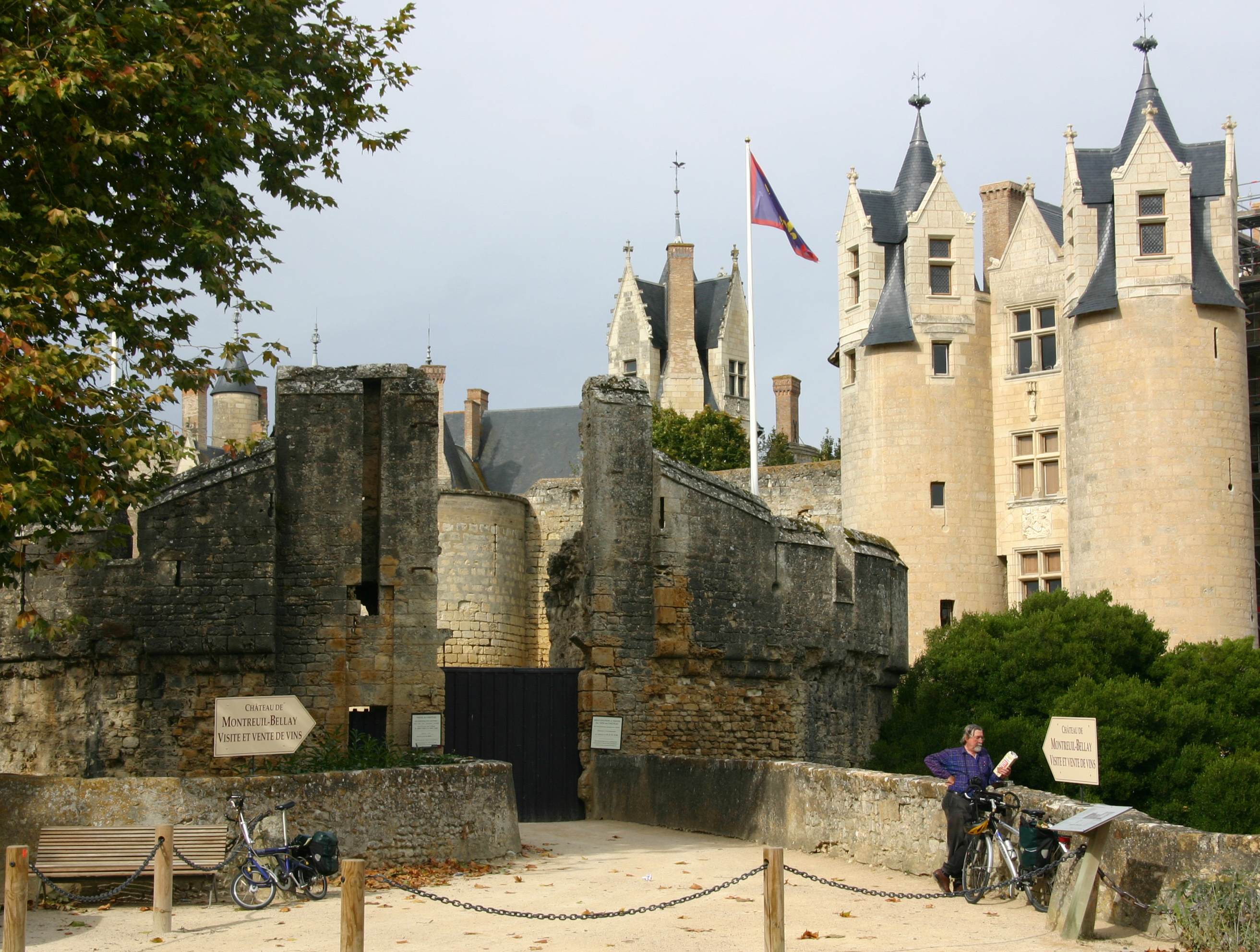 Schloss Montreuil-Bellay